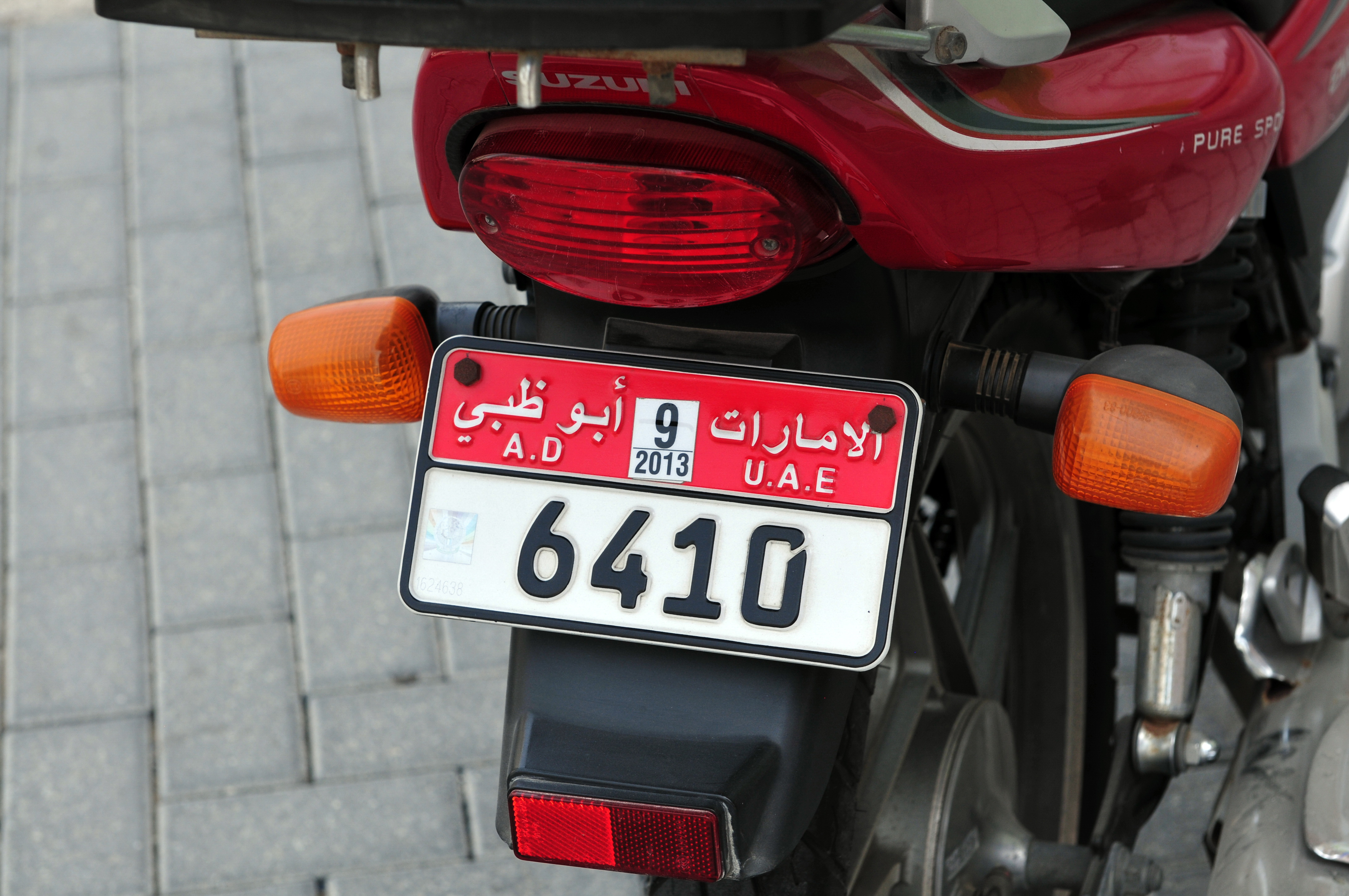 number plate on a moped in Abu Dhabi